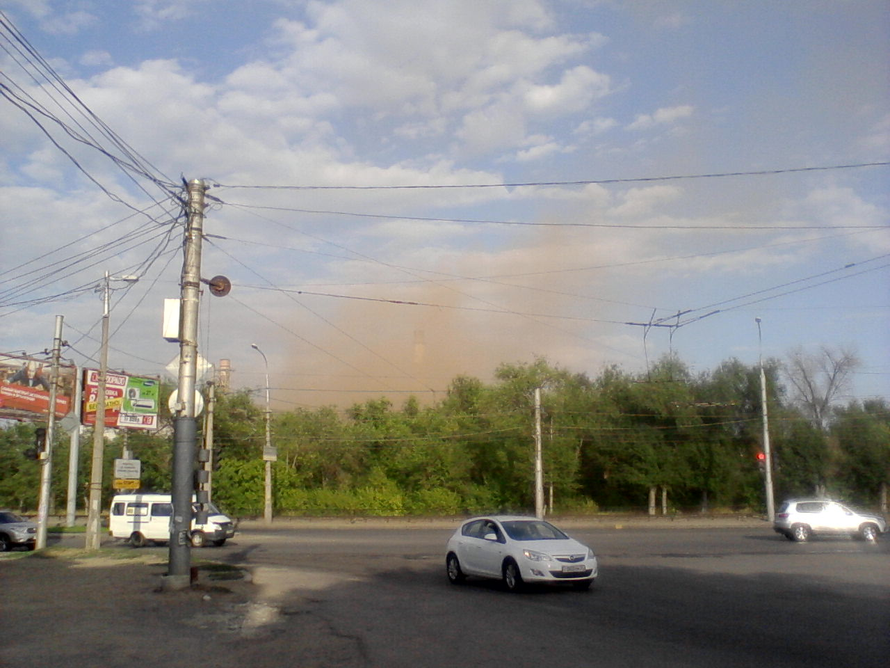 Красный Октябрь со стороны Первой продольной